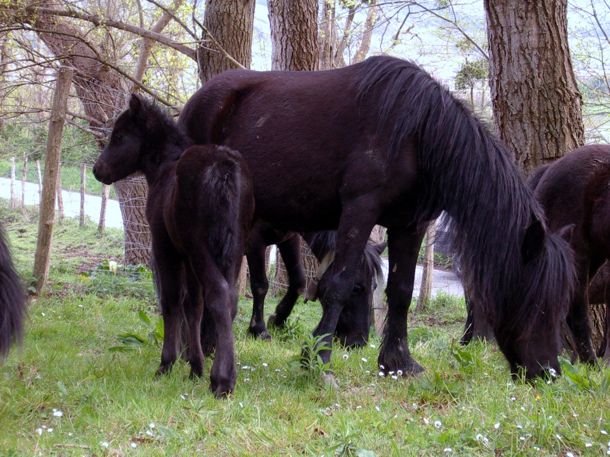 PoniVascoPottoka02